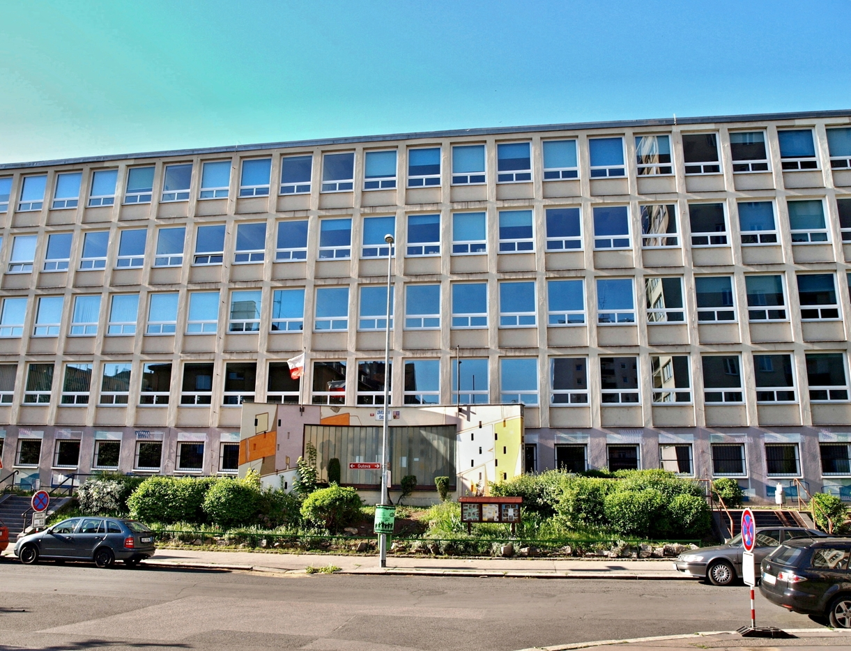 ZŠ Gutova